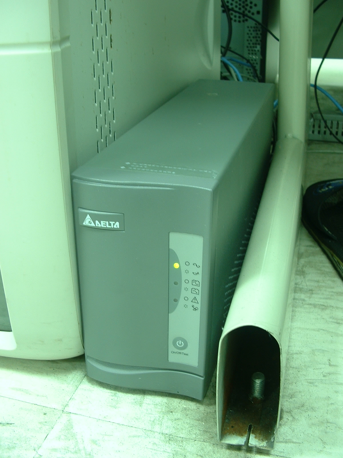 典型供PC使用的不斷電系統（深灰色物）。本圖為台達電子的產品。